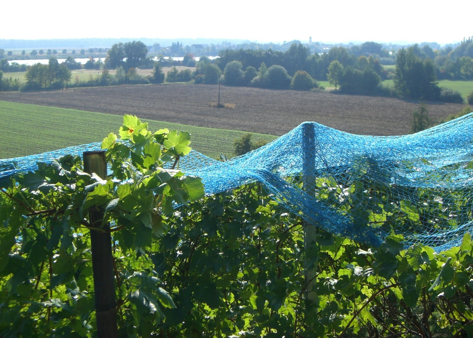 Weinbaugebiet Bach an der Donau - im Hintergrund die Donau